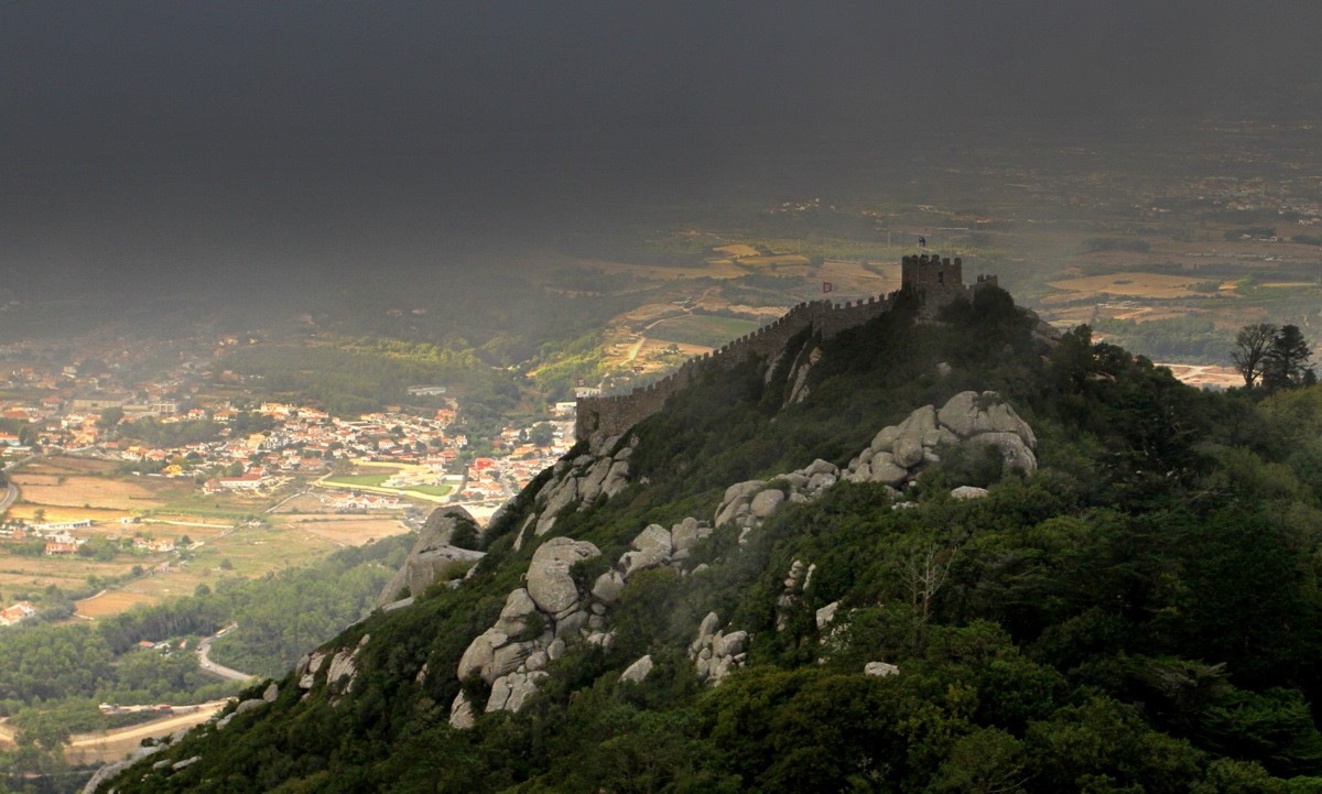 Castelo dos Mouros - Sintra This file was uploaded for Wiki Loves Monuments in Portugal with the unique identifier 336929.